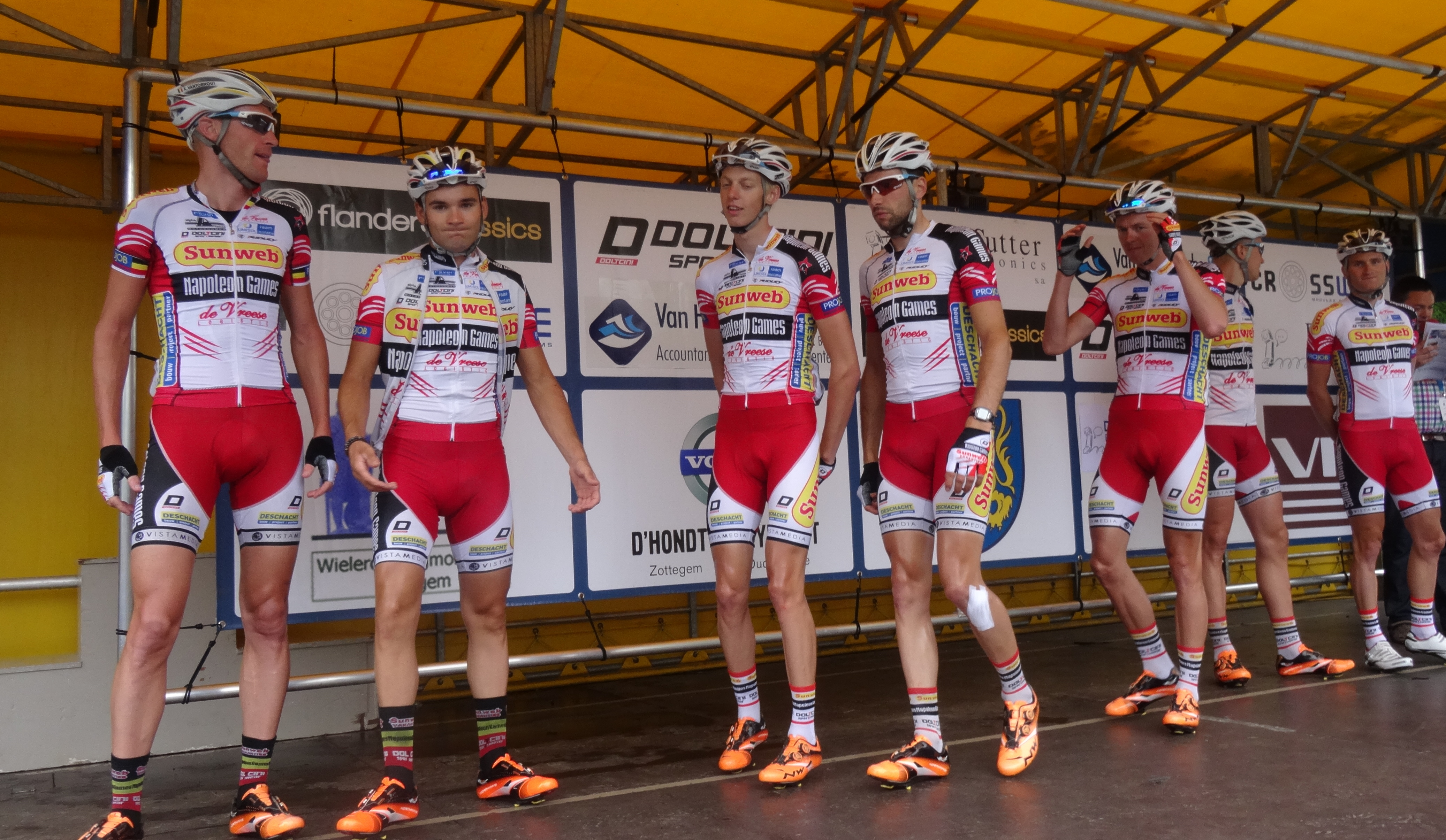 Reportage photographique réalisé le samedi 5 juillet à l'occasion du départ et de l'arrivée du Circuit Het Nieuwsblad espoirs 2014 à Grotenberge (Zottegem), Belgique.